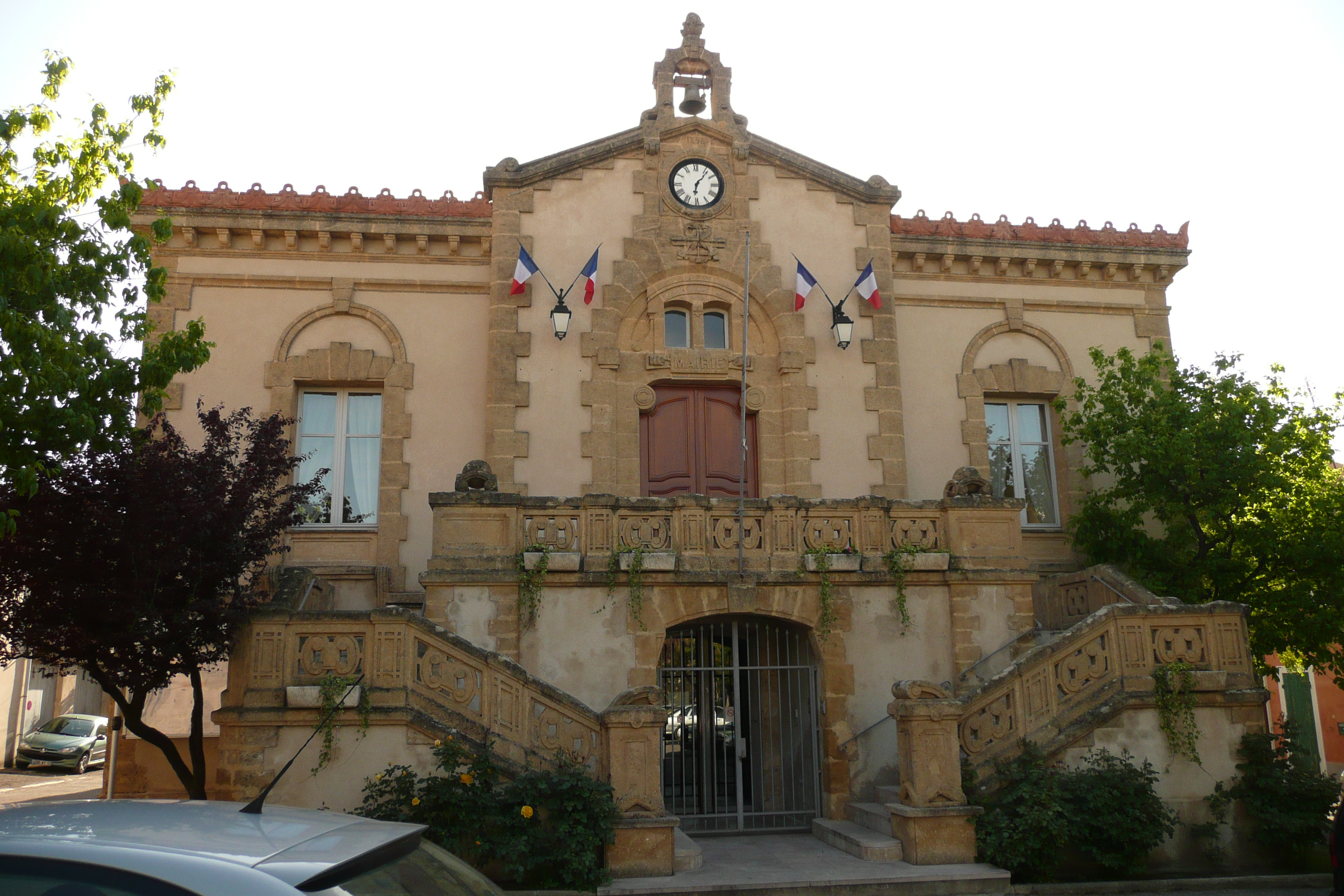 Hôtel de ville de Charleval (Bouches-du-Rhône, France)